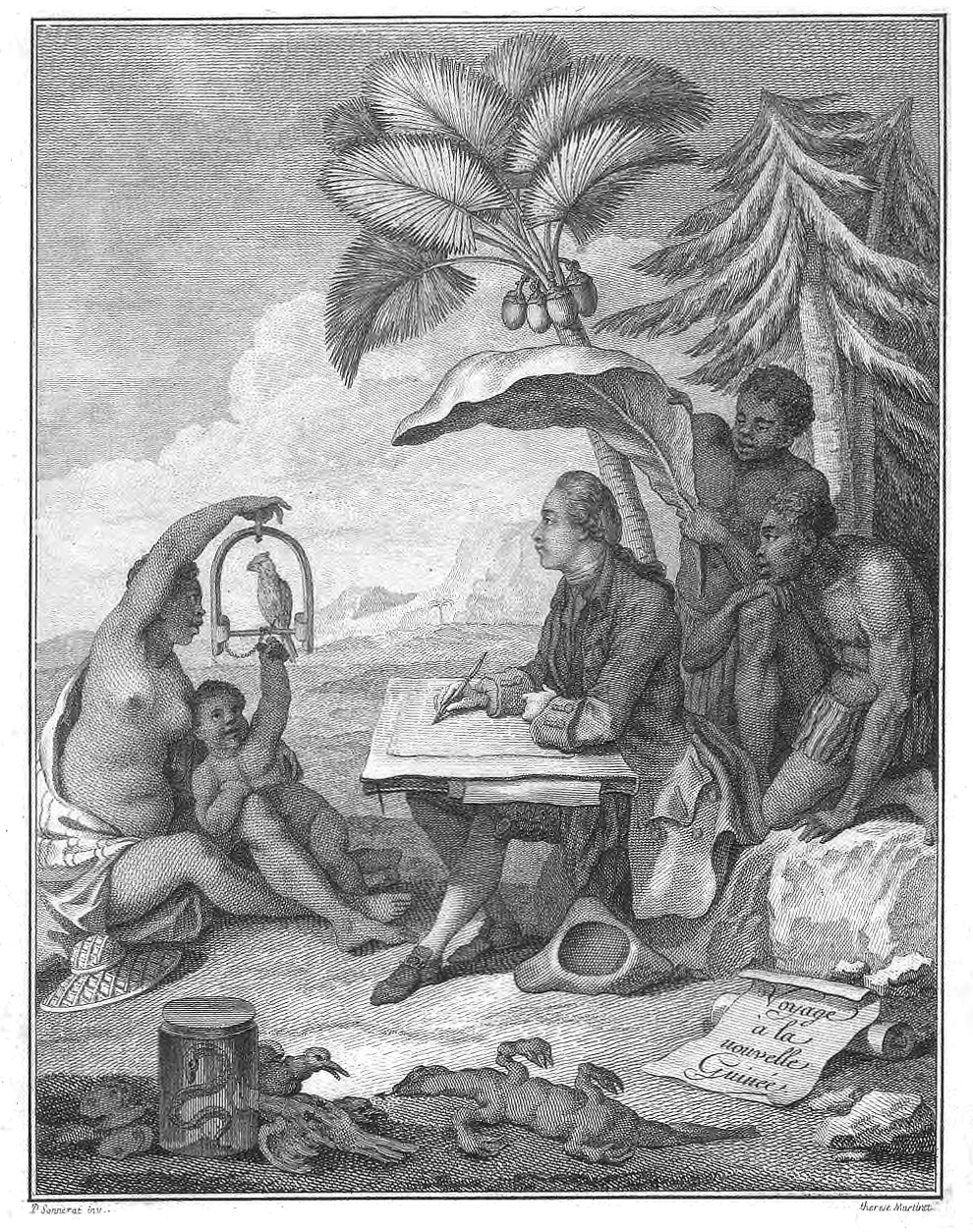 Gravure de Pierre Sonnerat /BnF